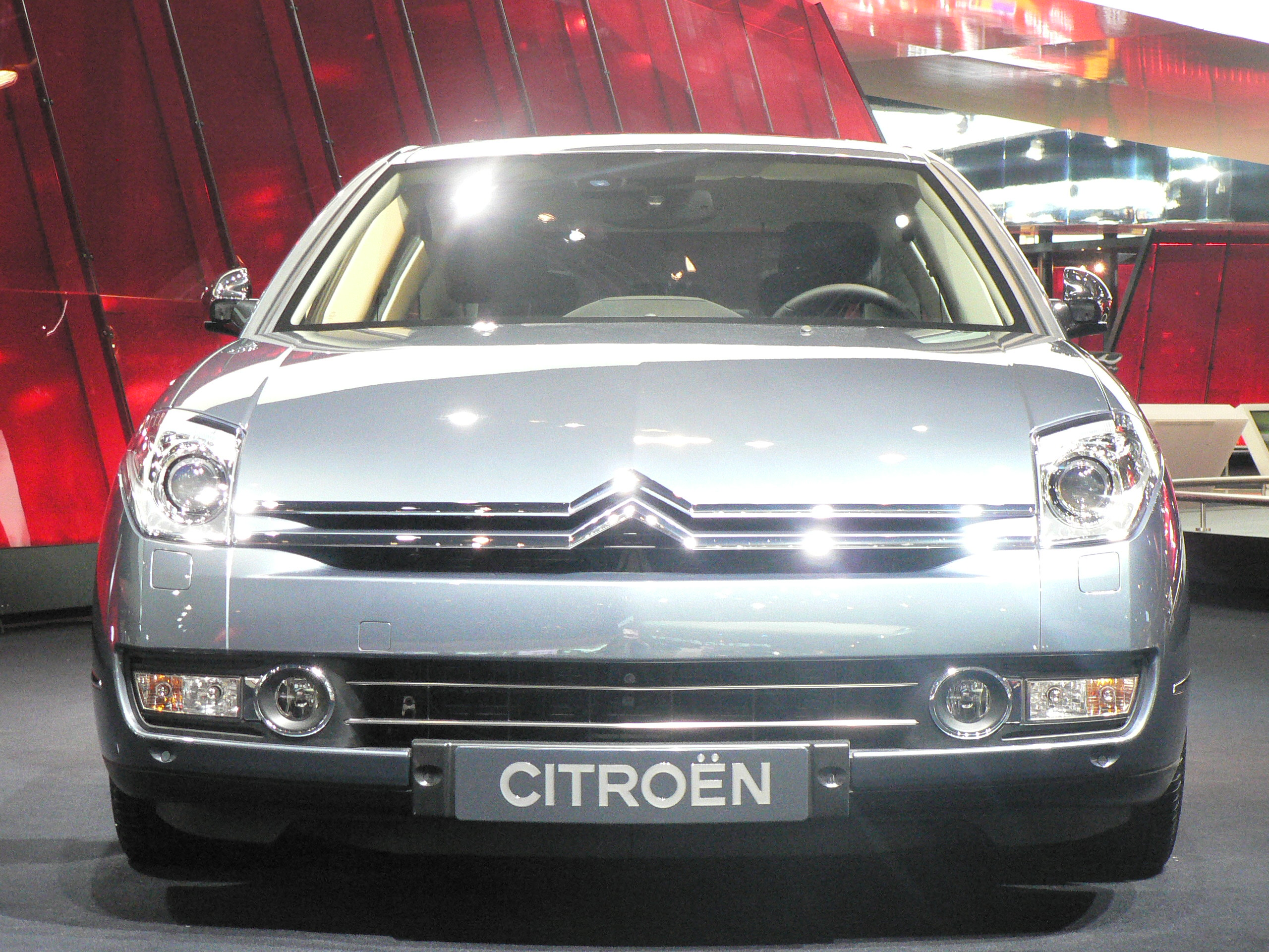 Mondial de l automobile de Paris (October 2006)